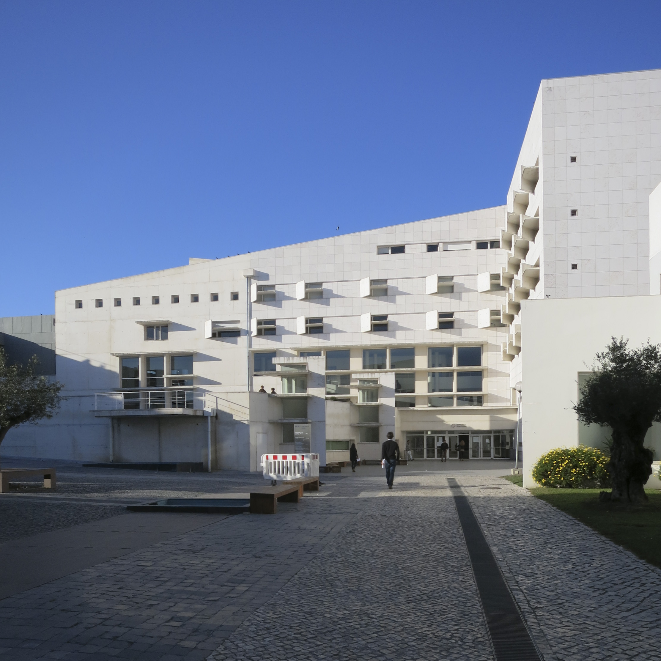 Raul Hestnes Ferreira, ISCTE, Lisboa